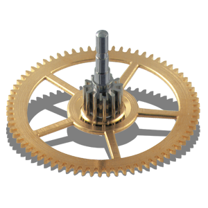 Mobile horloger dans un mouvement d'horlogerie haut de gamme